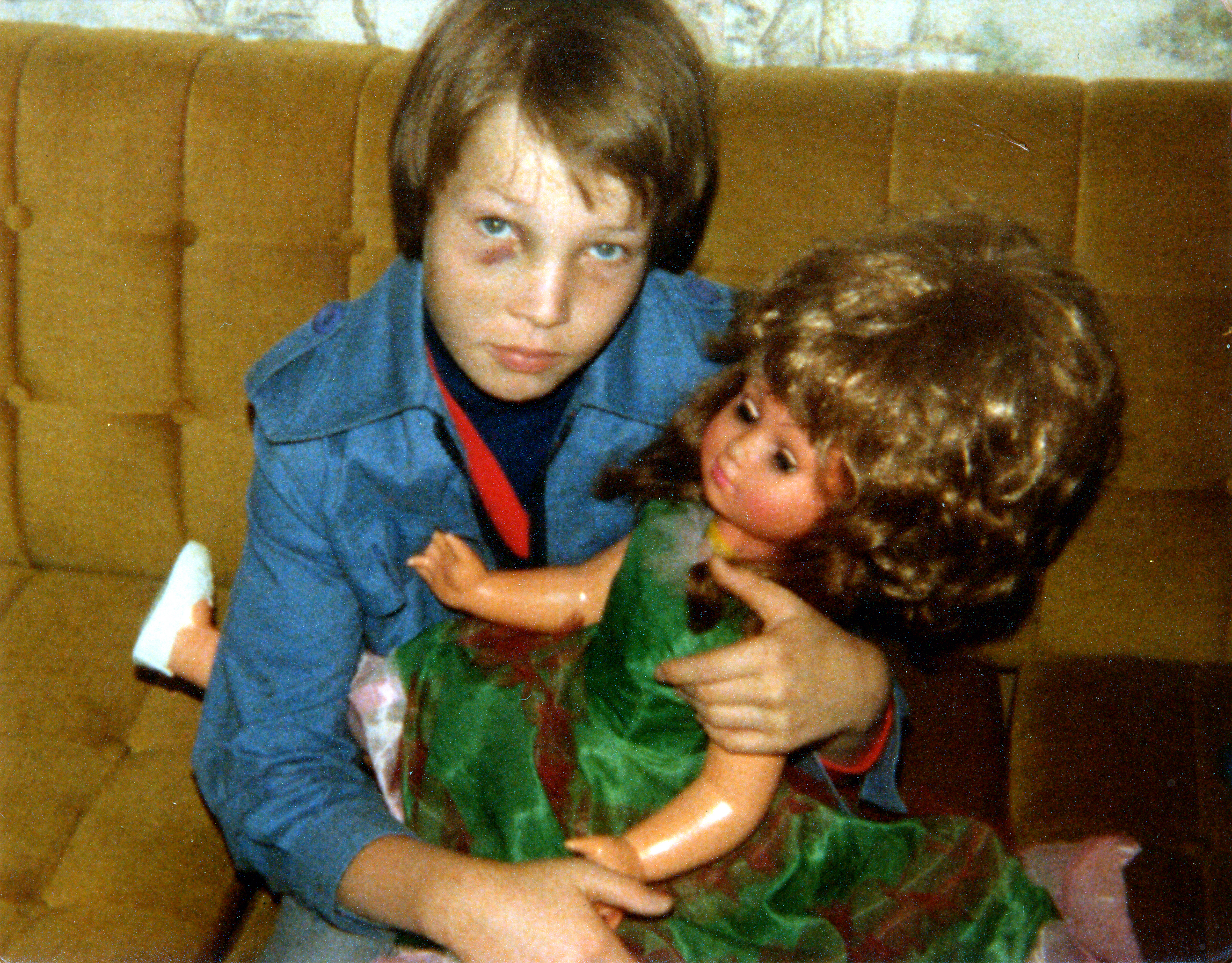 Image tirée du film « Remue-ménage » de Fernand Melgar.